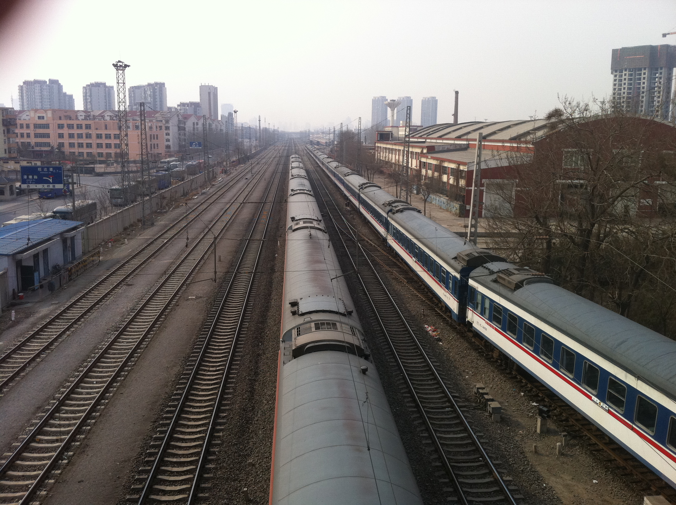 Hedong, Tianjin, China